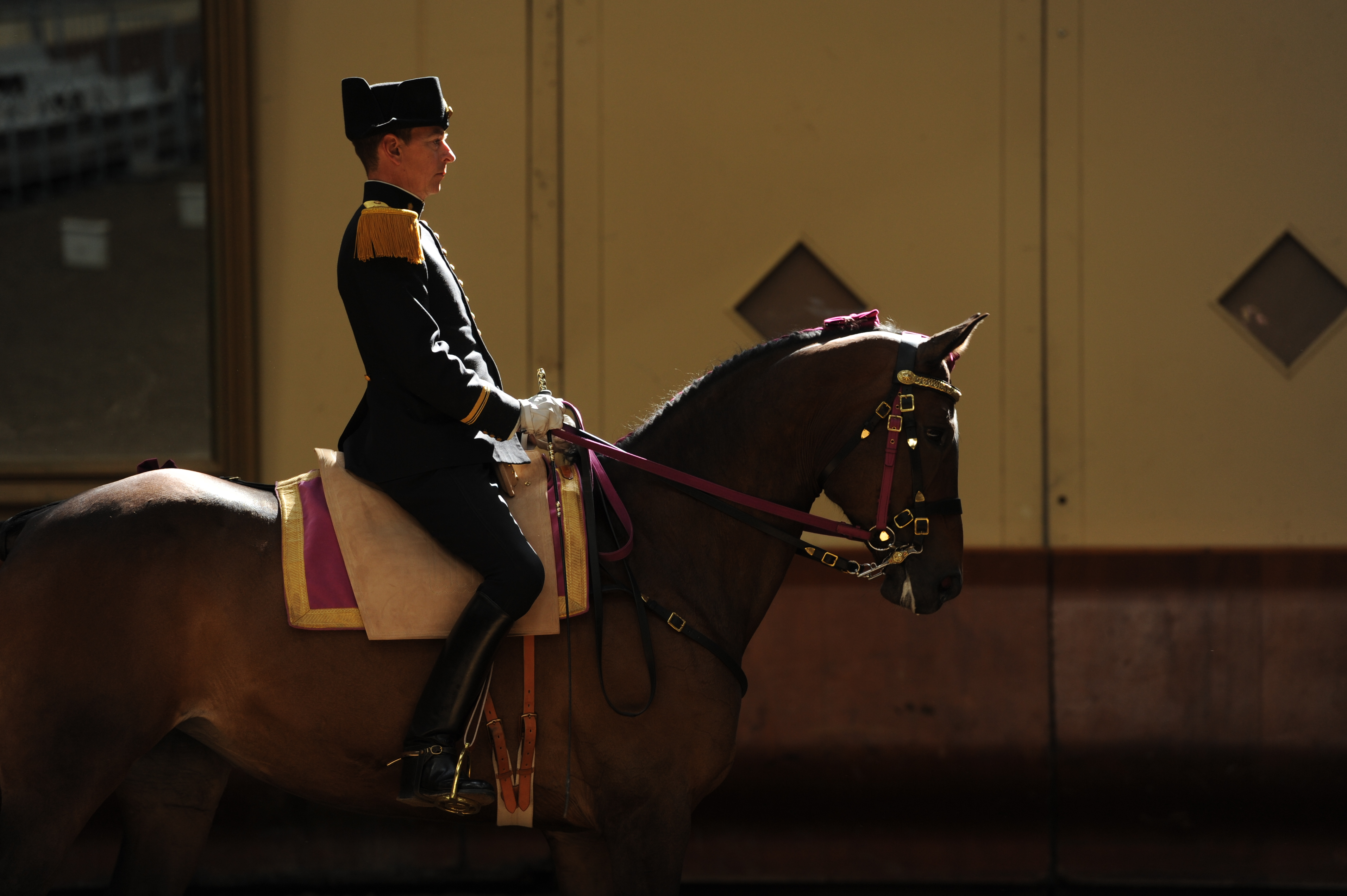 Tenue des écuyers du Cadre noir.